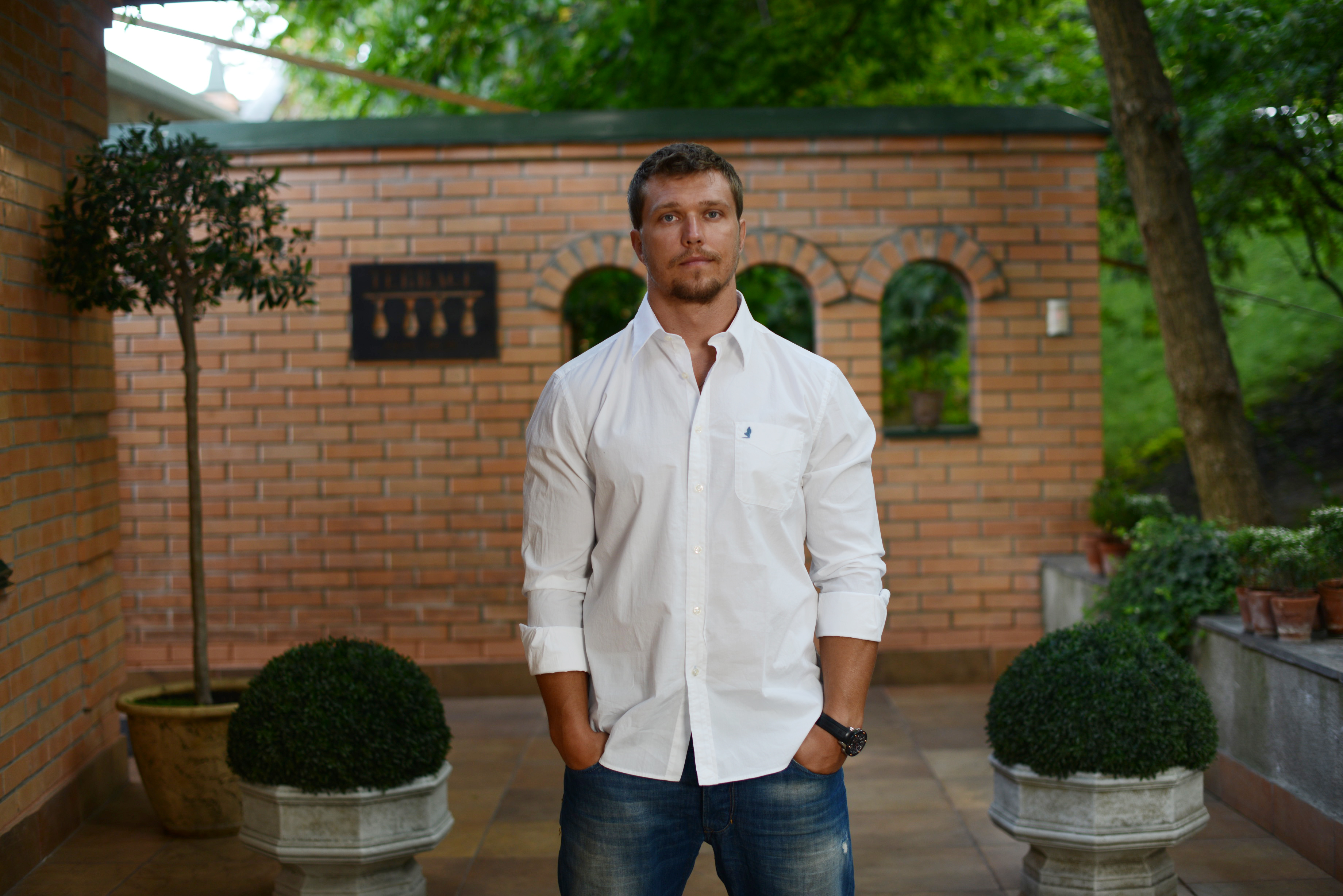 Конюшок Сергій